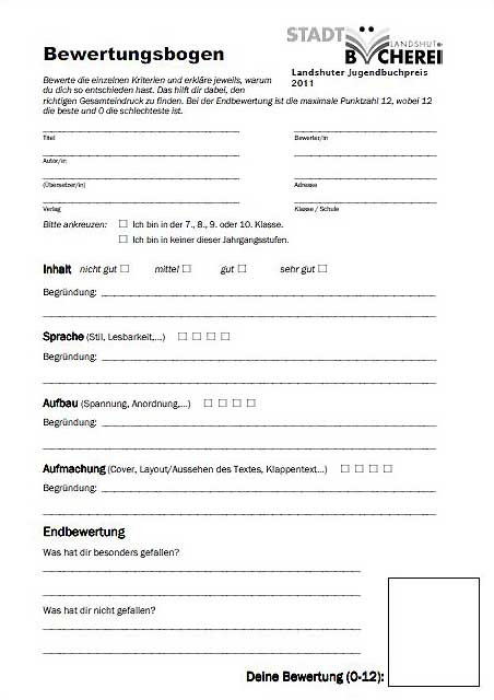 Bewertungsbogen zum Abstimmen für den Landshuter Jugendbuchpreis 2011